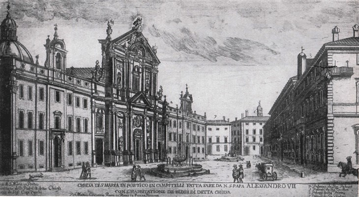 Chiesa di S. Maria in Campitelli